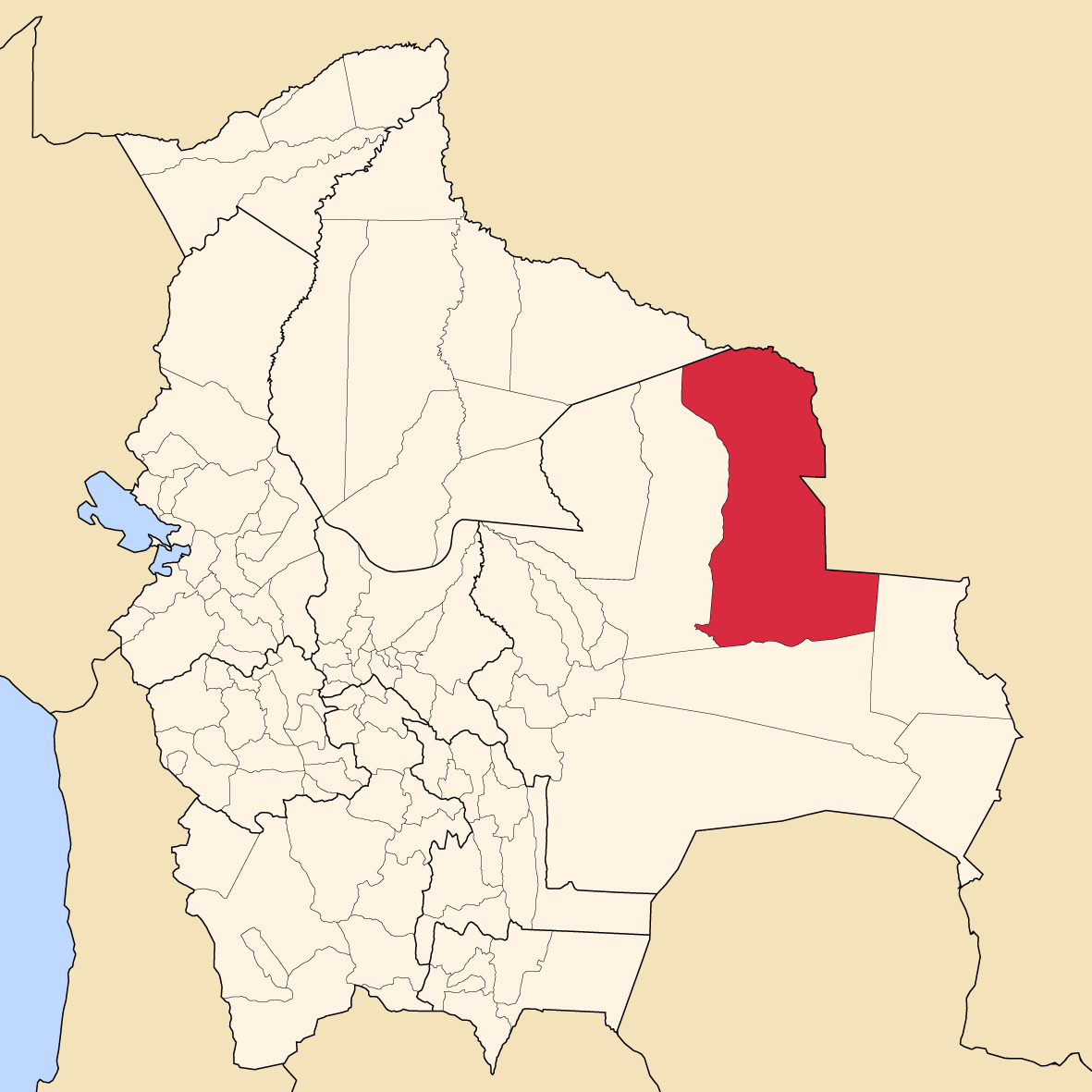 Map of Bolivia showing José Miguel de Velasco province, Santa Cruz